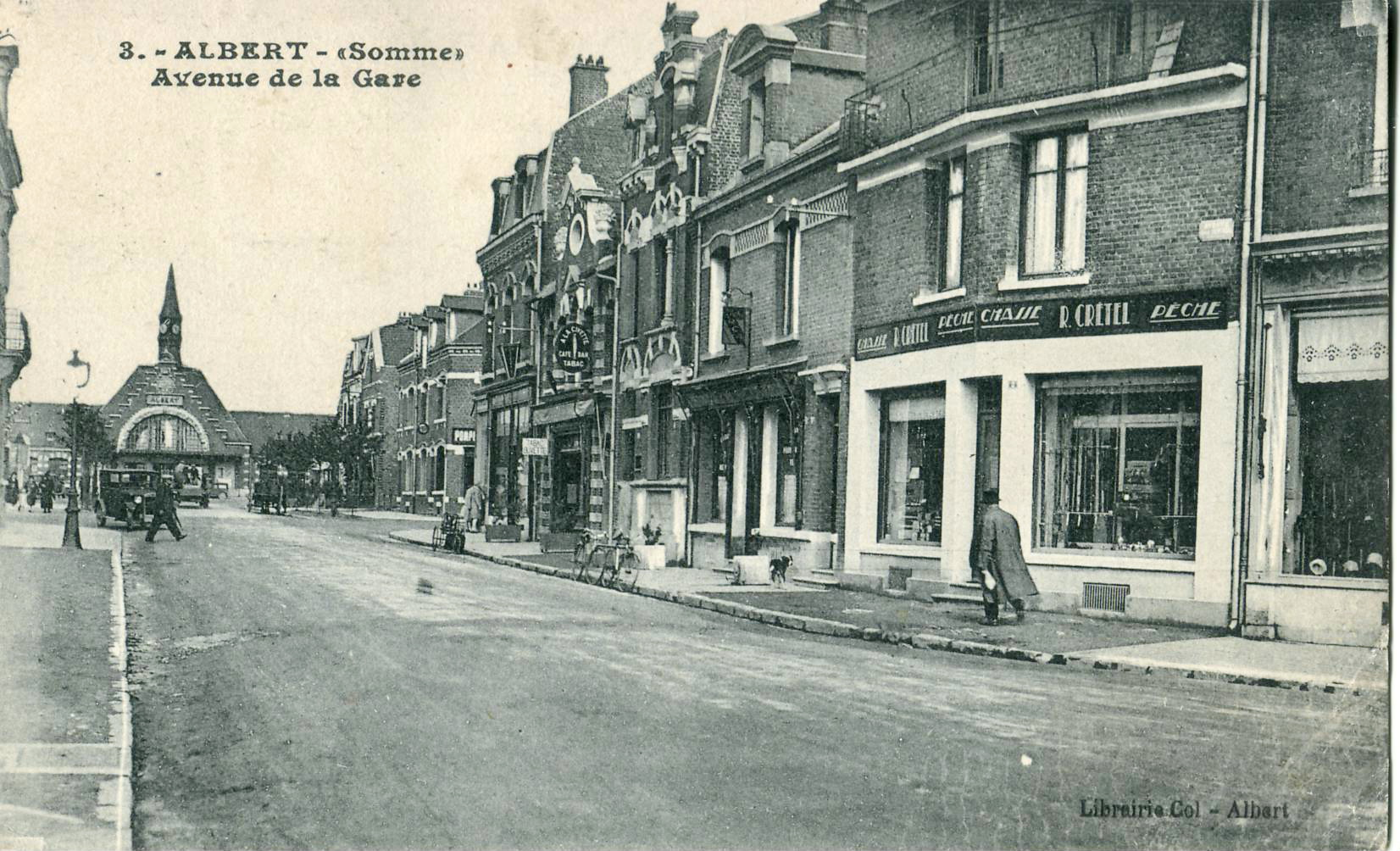 Carte postale semi-moderne éditée par la librairie Col à Albert, n°3 : ALBERT - Avenue de la Gare